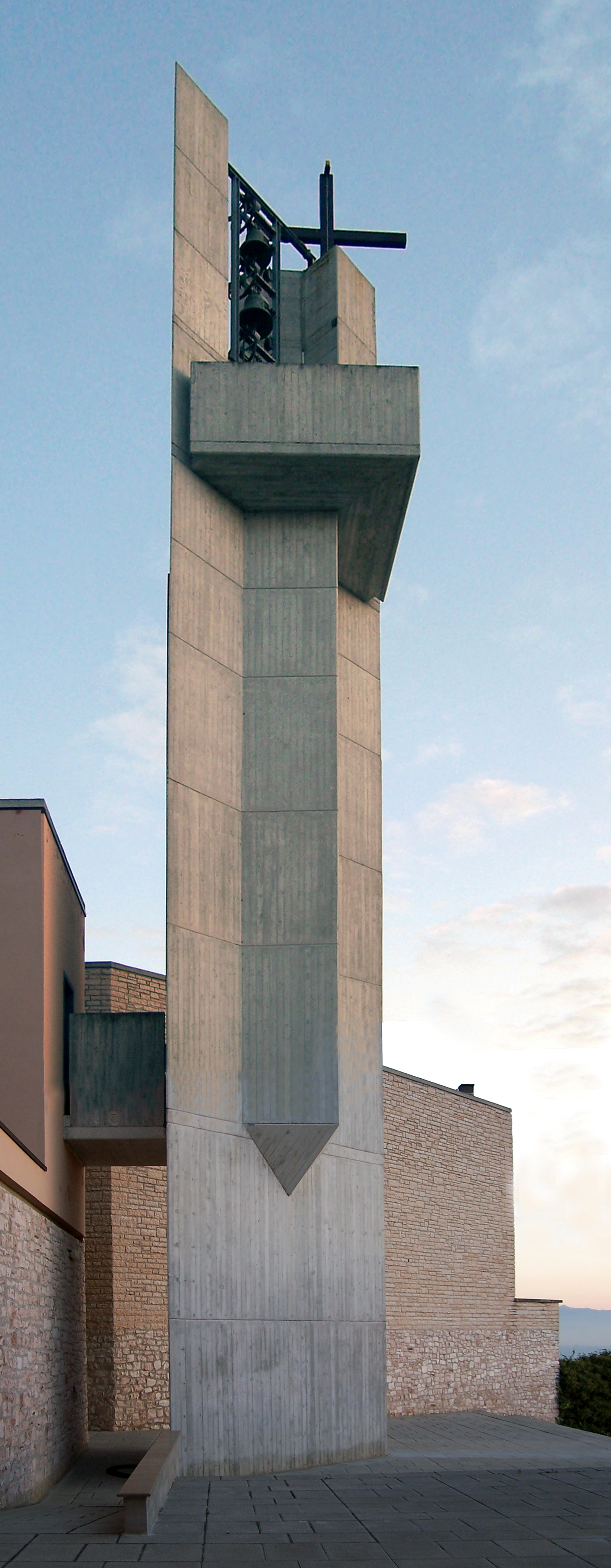 Lato Nord del Campanile del Monastero di S. Maria di Betlem di Foligno